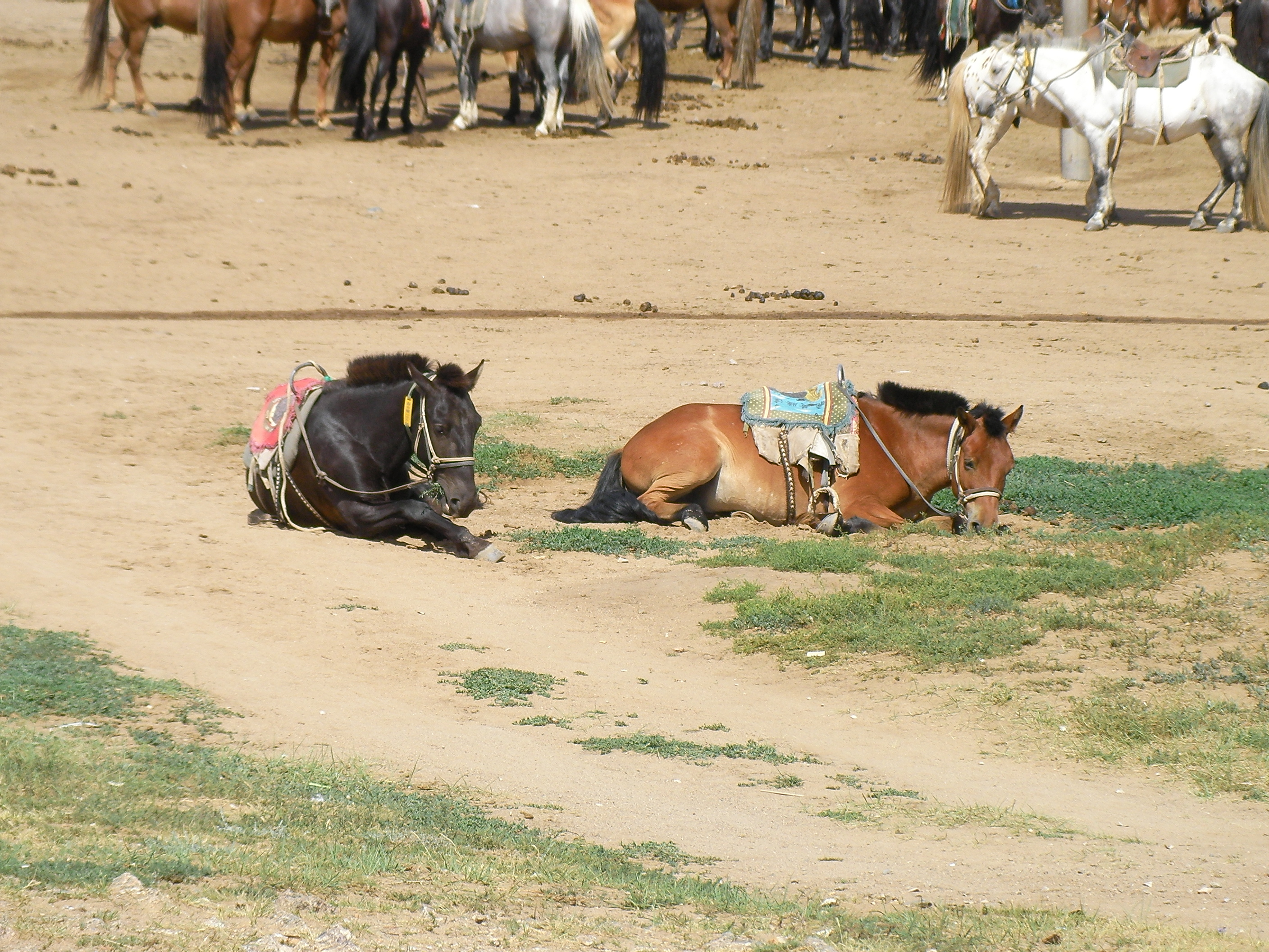 中文（香港）: 兩匹馬跪在地上